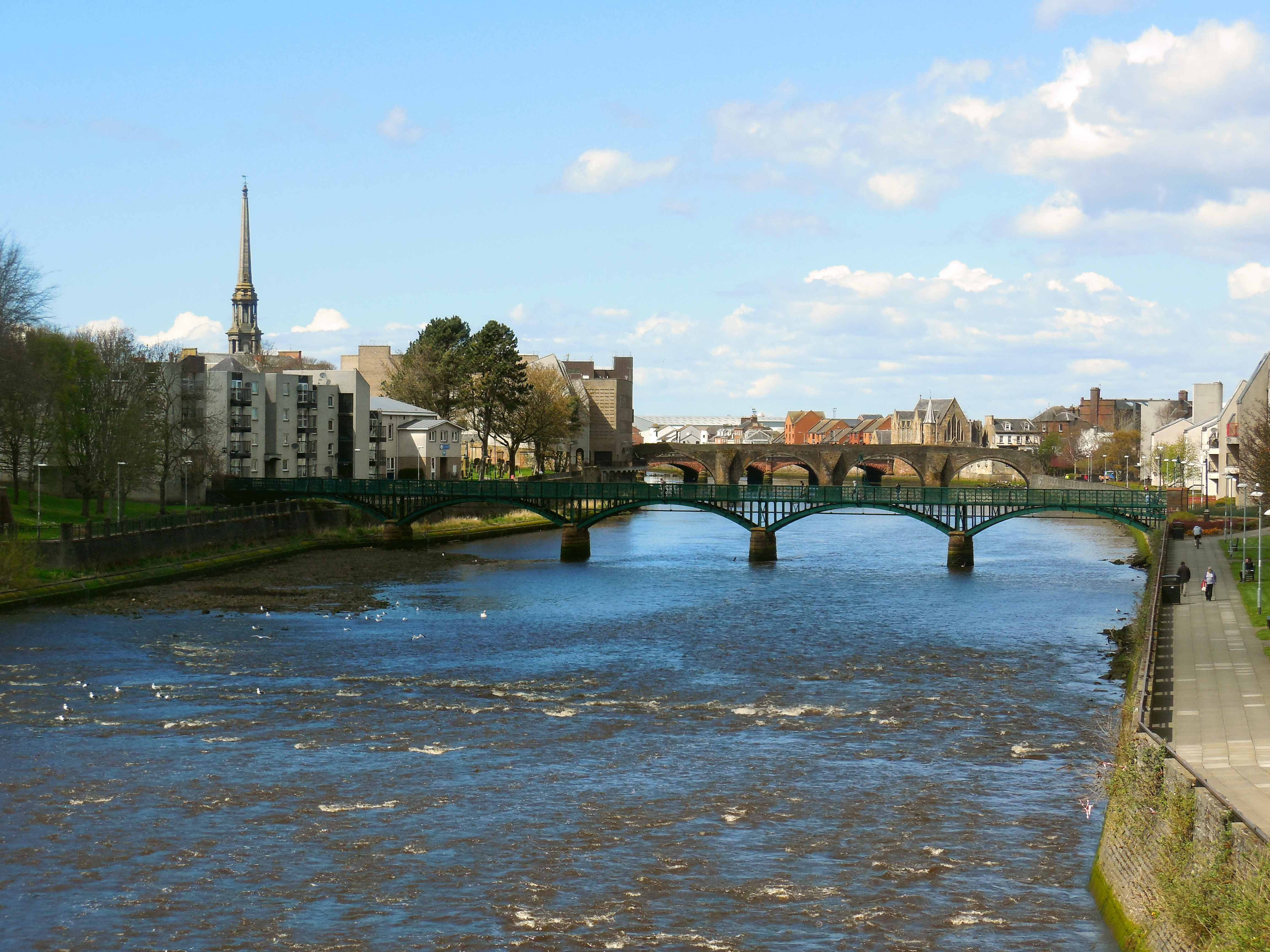 AYR